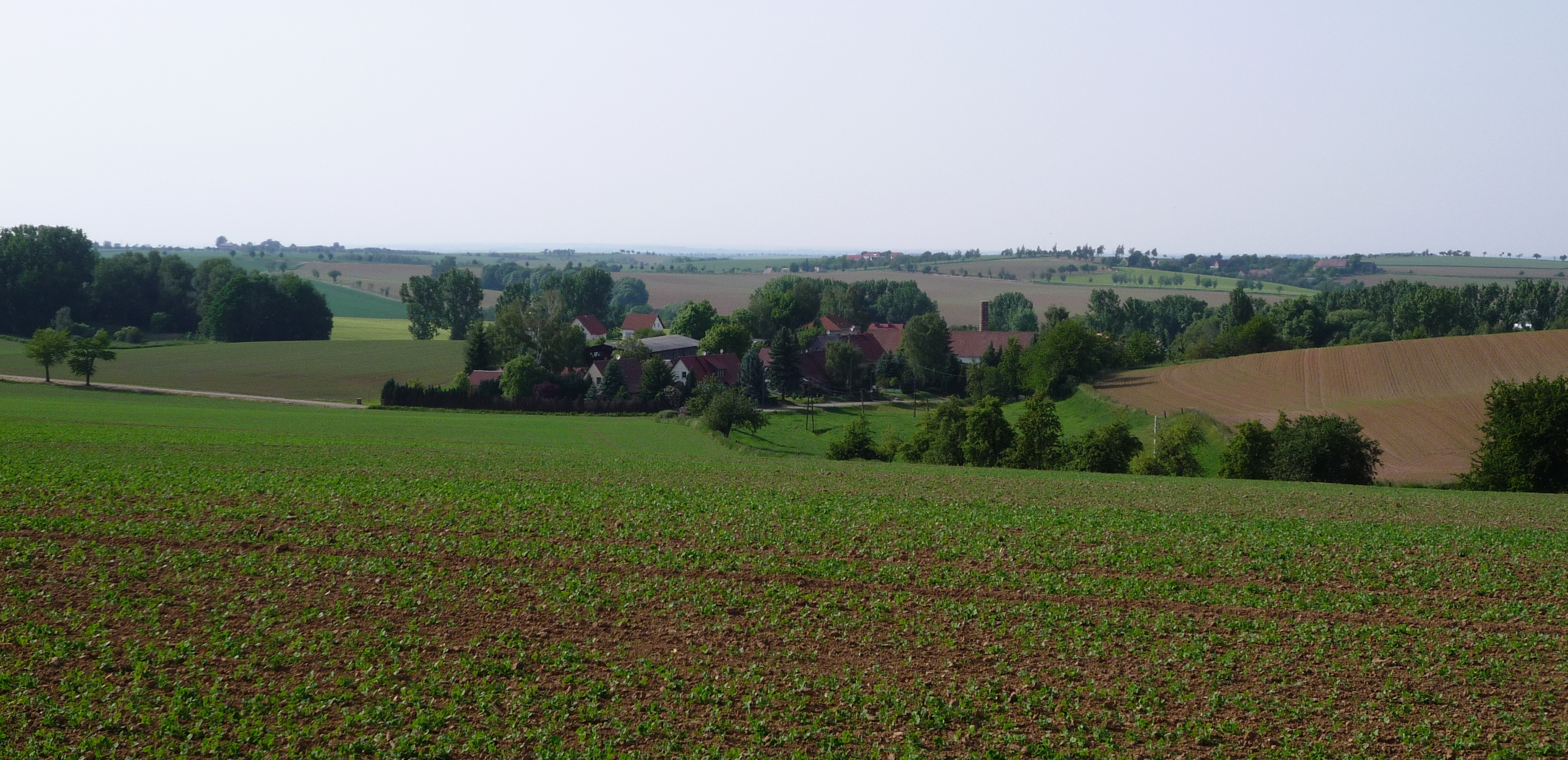 Blick auf Schletta, einen Ortsteil der Gemeinde Schletta